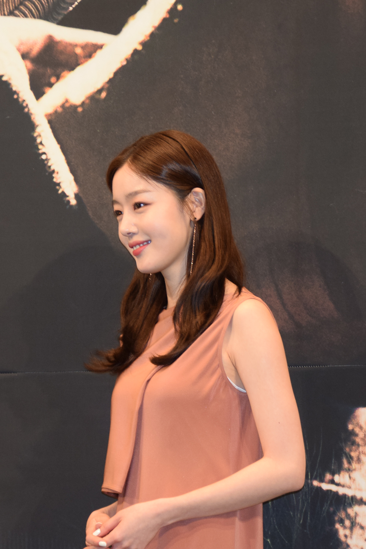 한선화 OCN오리지널 '구해줘2' 제작발표회 (2019.4.30)